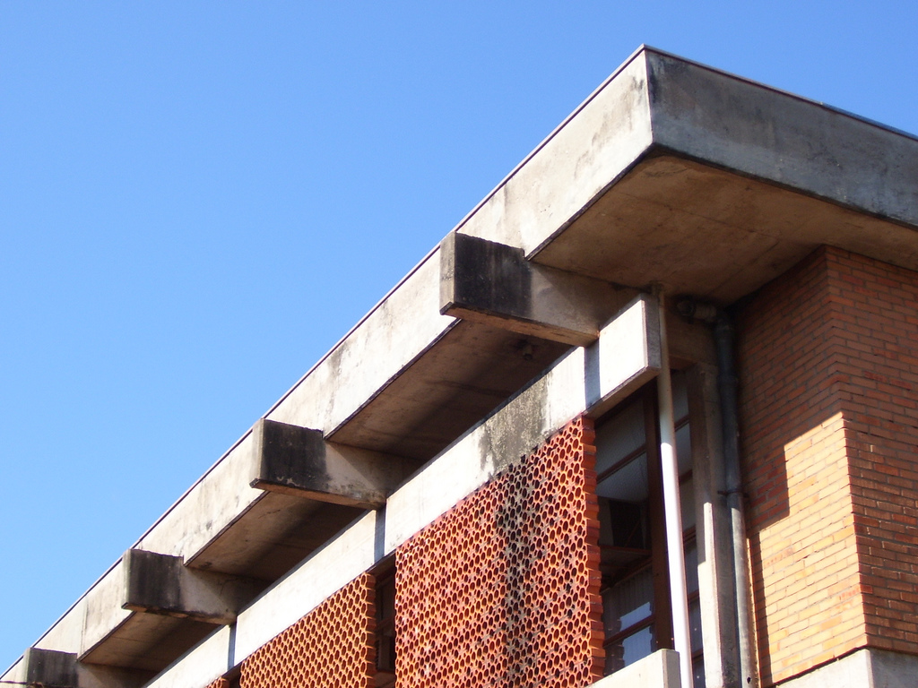 Cobogó no Bloco A da Faet, UFMT, Cuiabá.